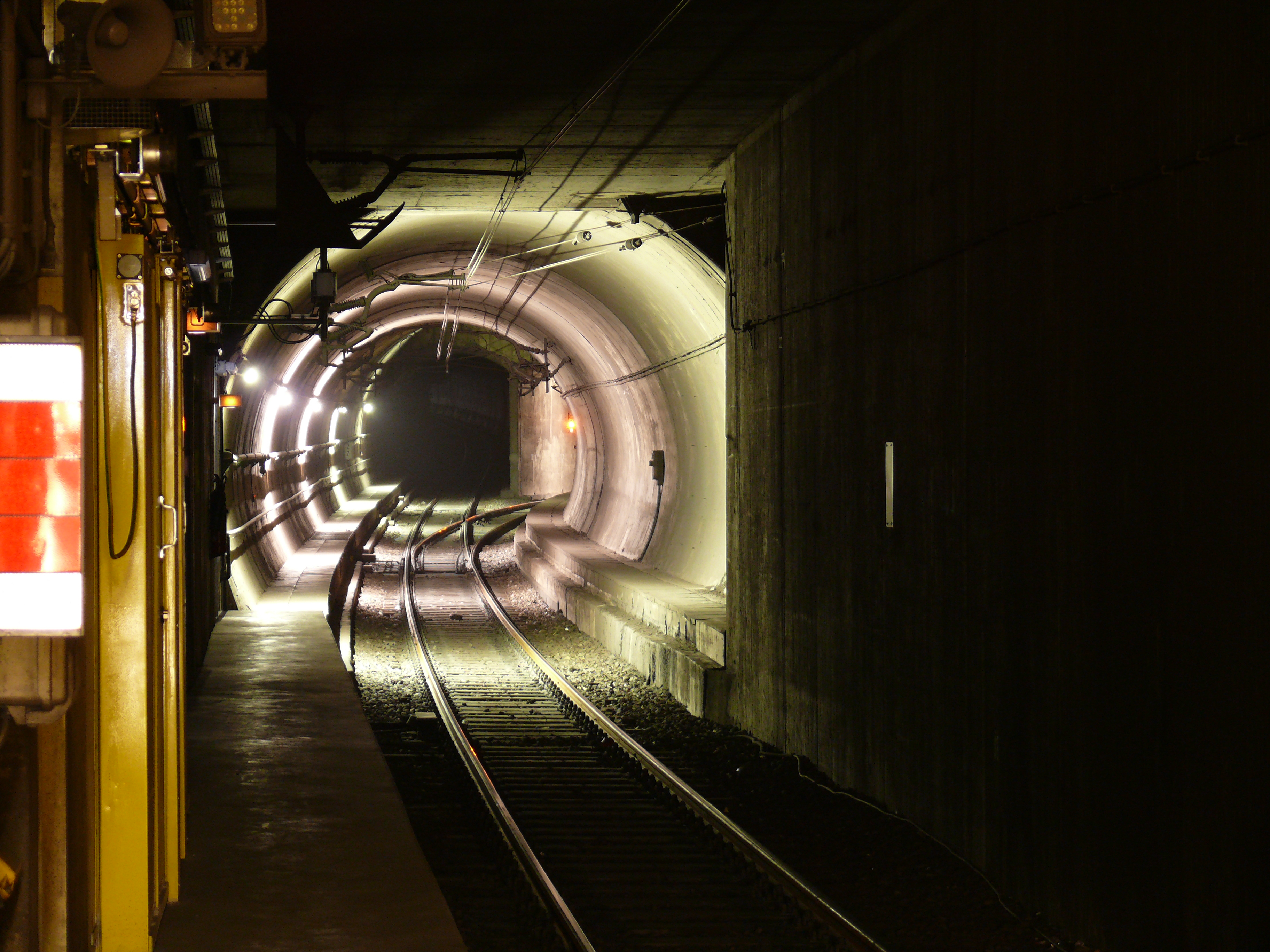 Blick in den an die Station anschließenden (bergmännischen) Hasenbergtunnel Richtung Stuttgart-Vaihingen, am unterirdischen S-Bahnhof Schwabstraße in Stuttgart. Rechts zweigt die unterirdische Wendeschleife ab.